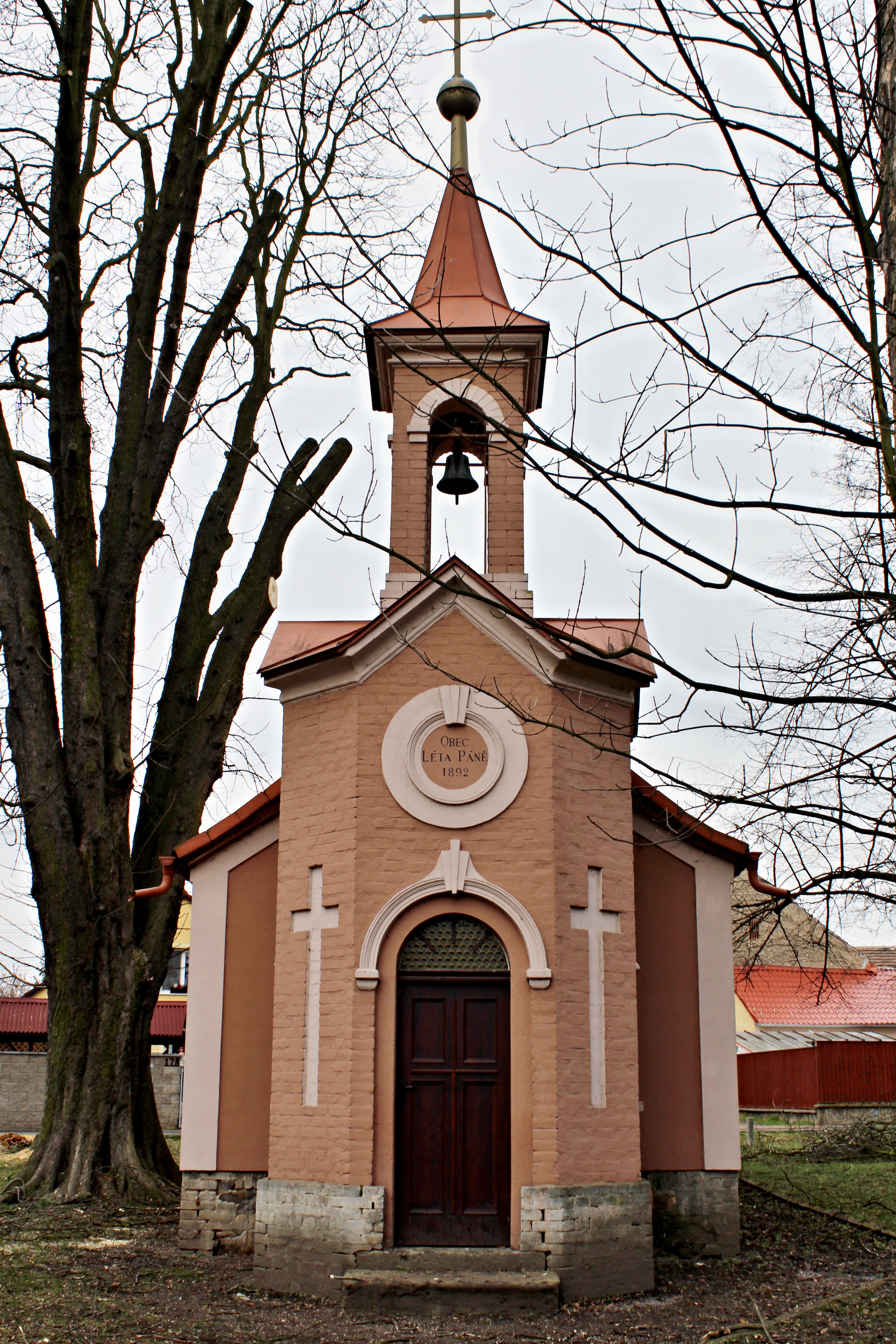 Charášťany kaple z roku 1892